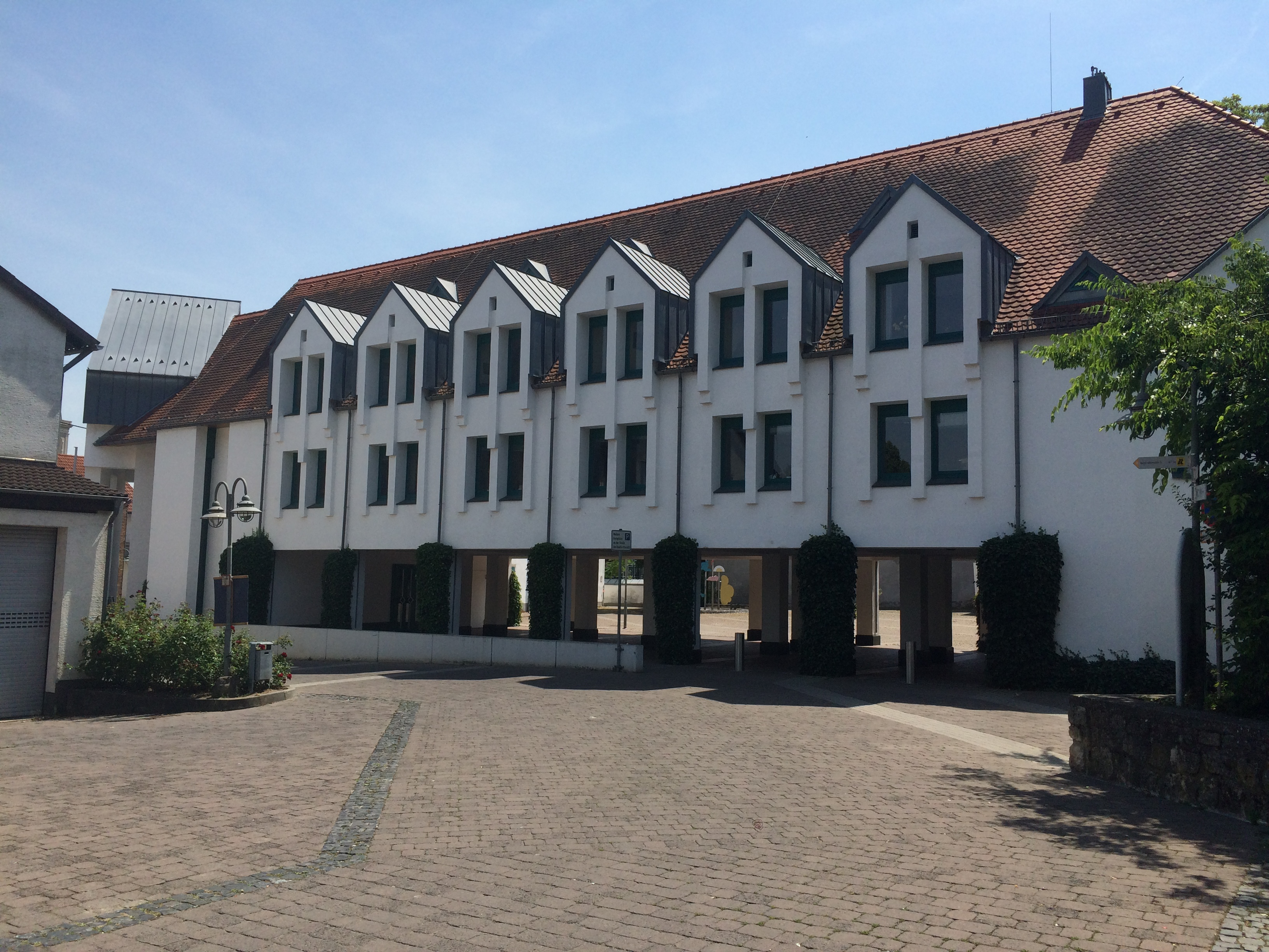 Verwaltung Verbandsgemeinde Bodenheim